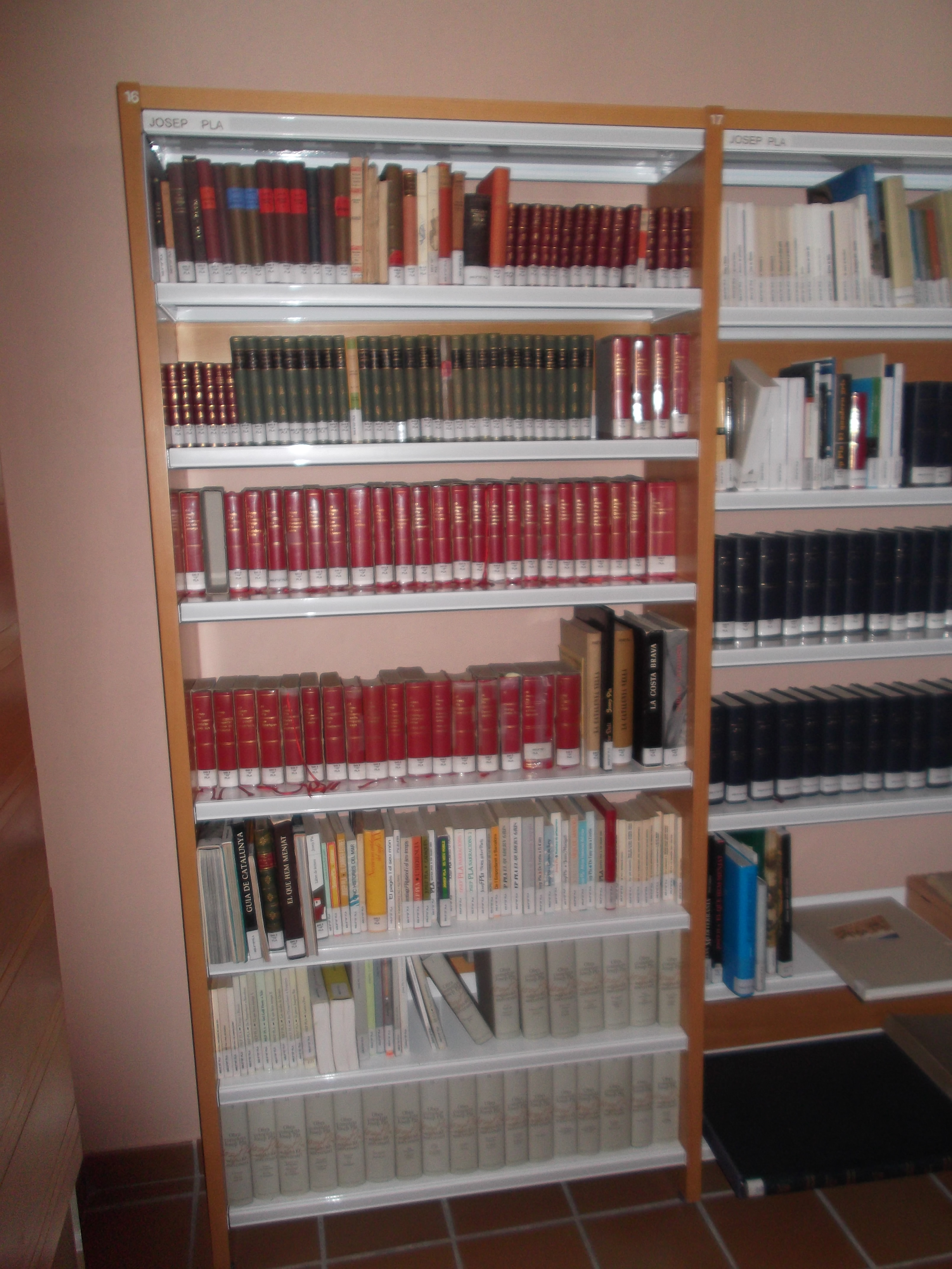 Prestatgeries de les obres publicades de Josep Pla a la Fundació Josep Pla